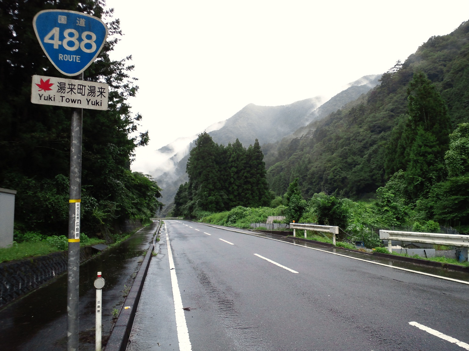 広島市佐伯区湯来町湯来付近の国道488号。